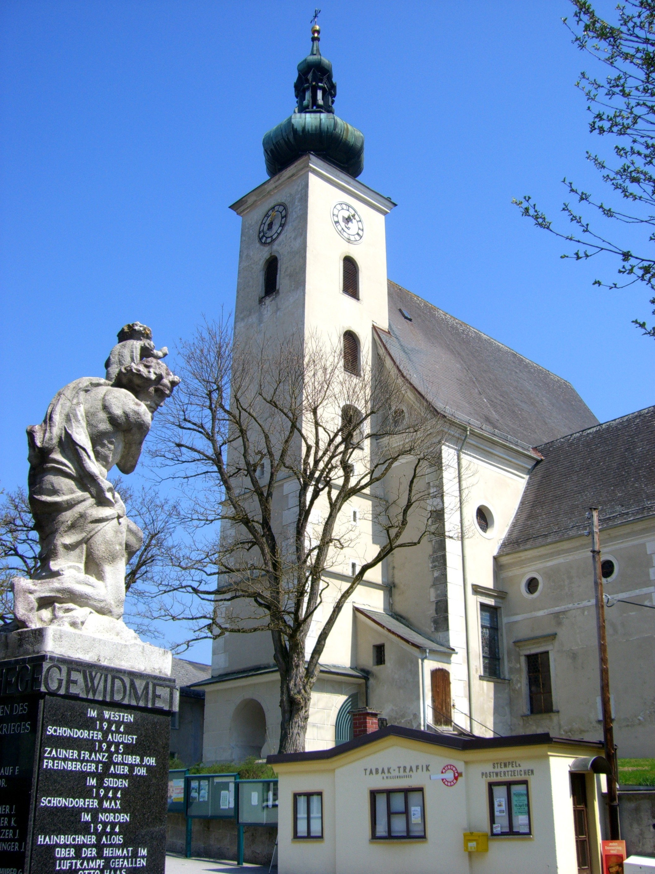 Pfarrkirche St. Stephanus (Offenhausen) vom Marktplatz aus (im Vordergrund: Christophorus-Statue am Marktbrunnen)